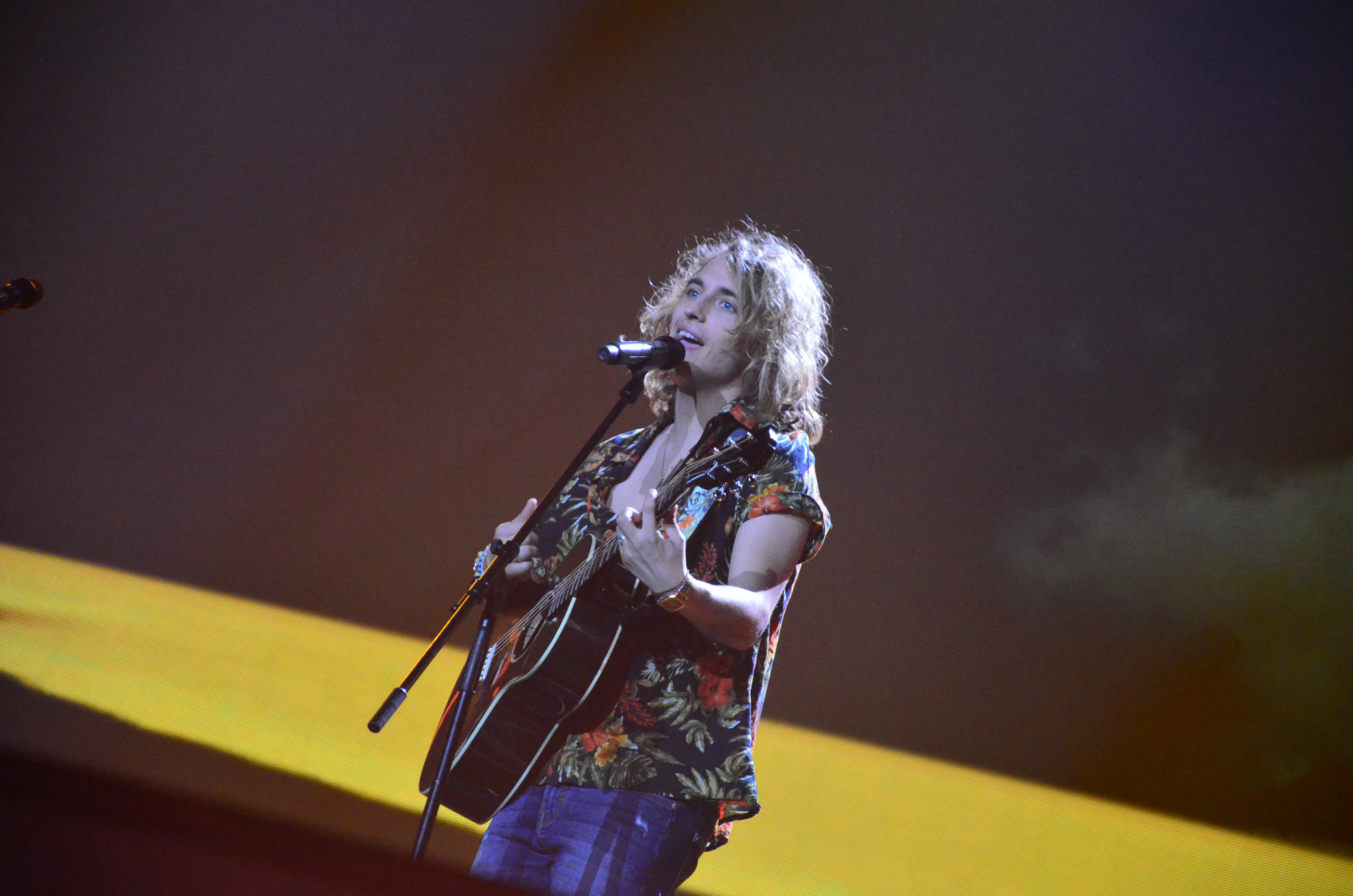 12 травня. Генеральна репетиція фіналу Євробачення 2017. Manel Navarro (Spain).